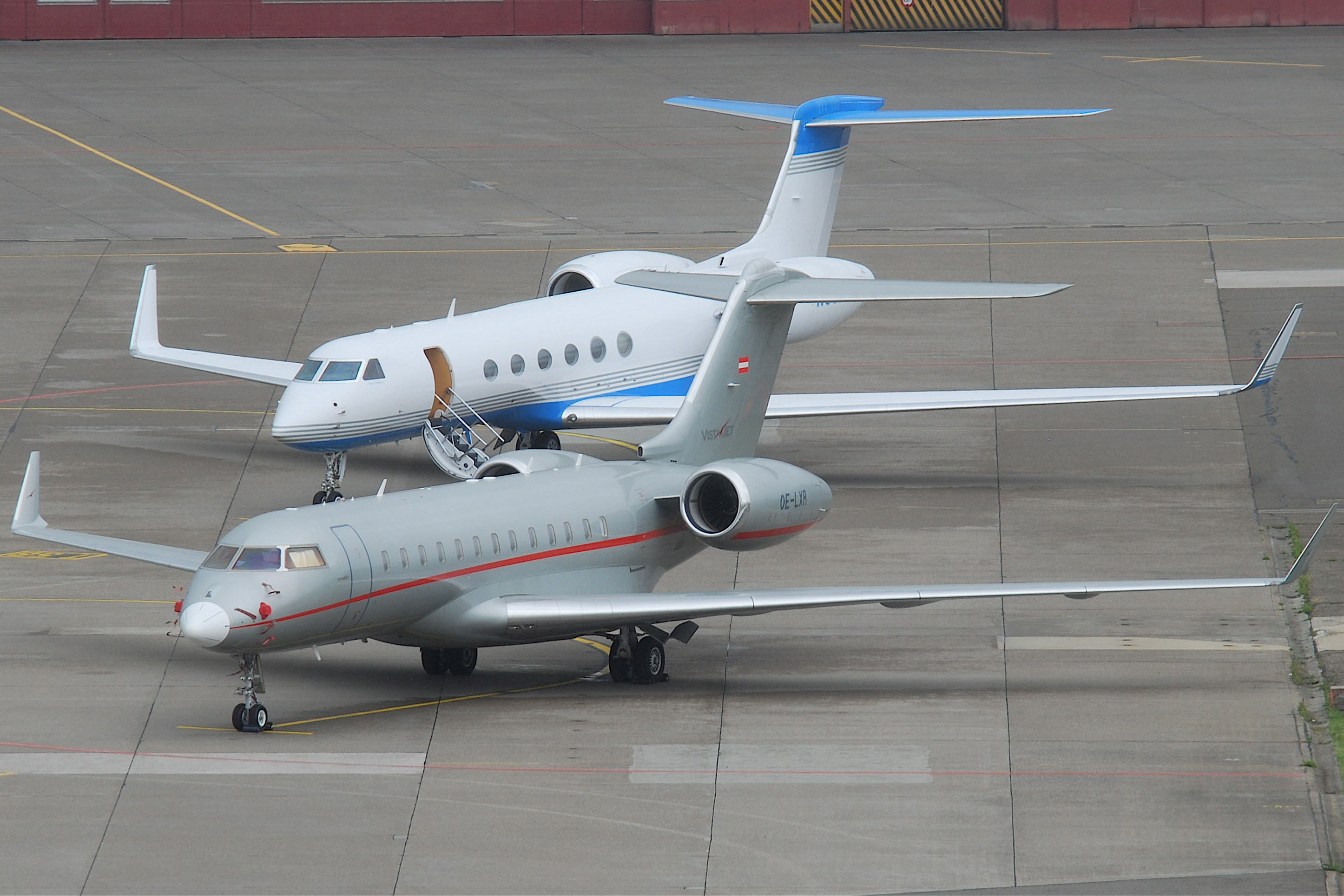 Vista Jet Bombardier BD-700-1A10 Global Express XRS; OE-LXR@ZRH;08.06.2011